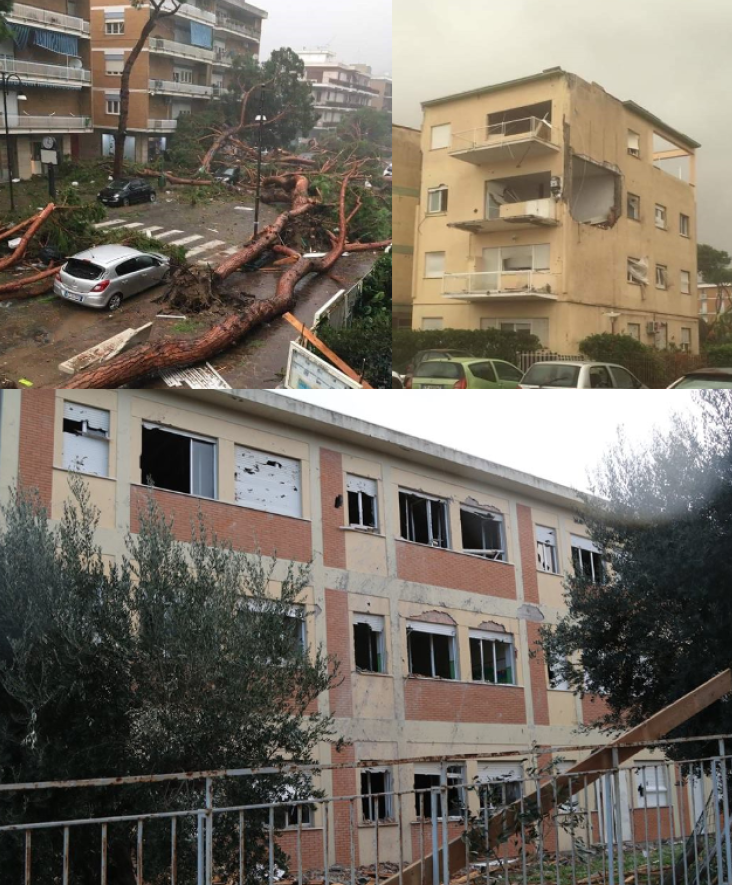 Danni a Terracina provocati dalla Tromba d'aria del 29 ottobre 2018. In alto a sinistra il Viale della Vittoria distrutto, in alto a destra il punto d'impatto della Tromba d'aria sulla costa sul Lungomare di Terracina, in basso una scuola paritaria distrutta dalle macerie degli edifici lesionati scagliate dal vento nel Centro Storico.